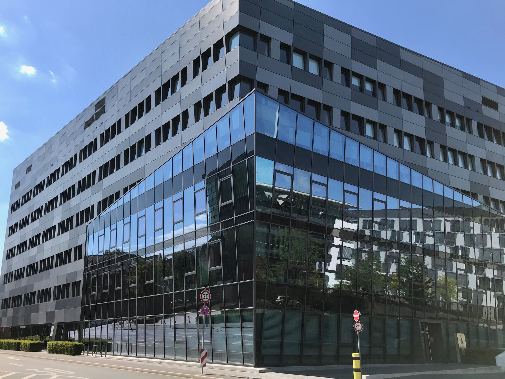 dwpbank, Derendorfer Allee 2, Düsseldorf